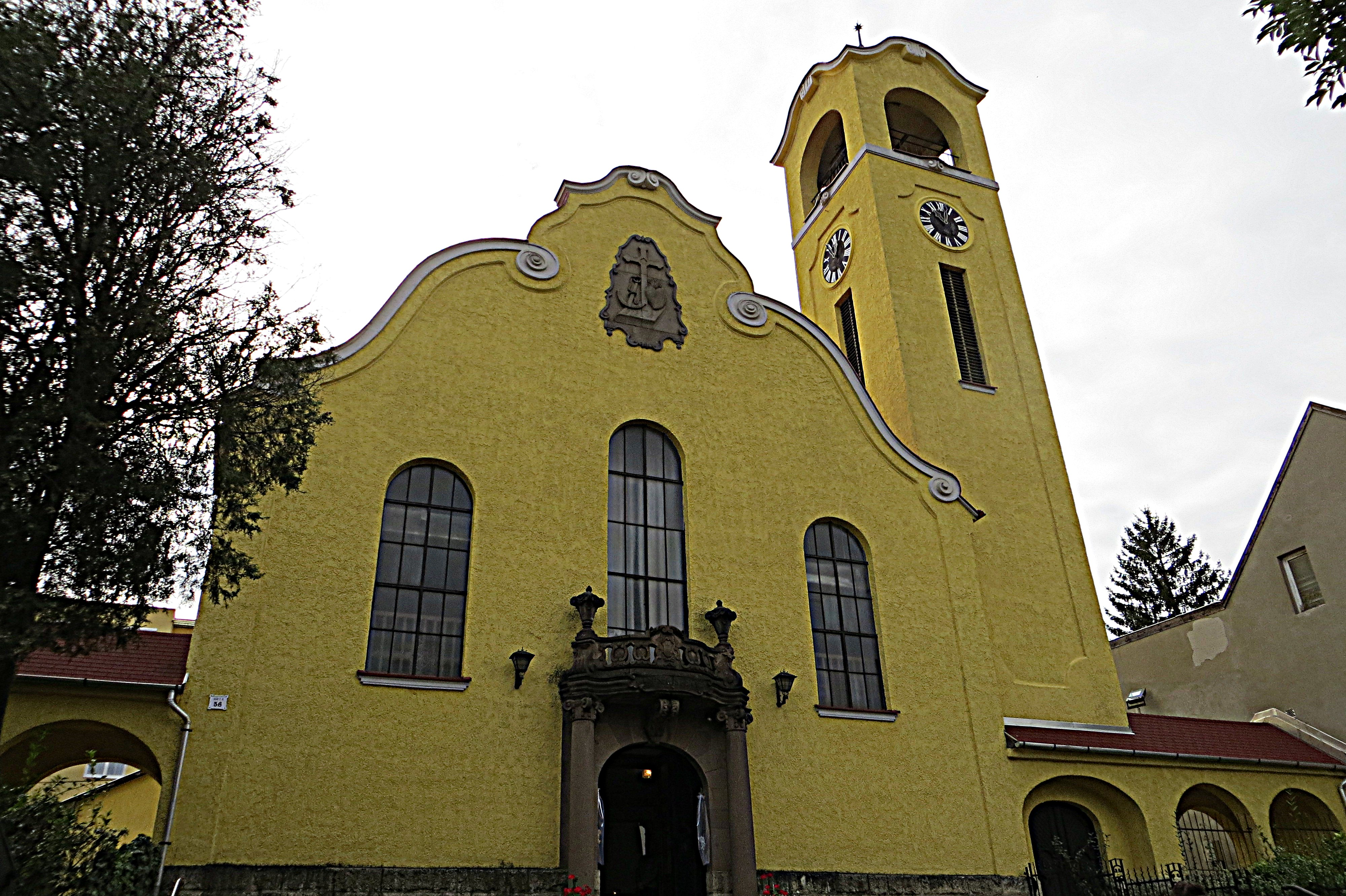 Egri Református gyülekezet temploma